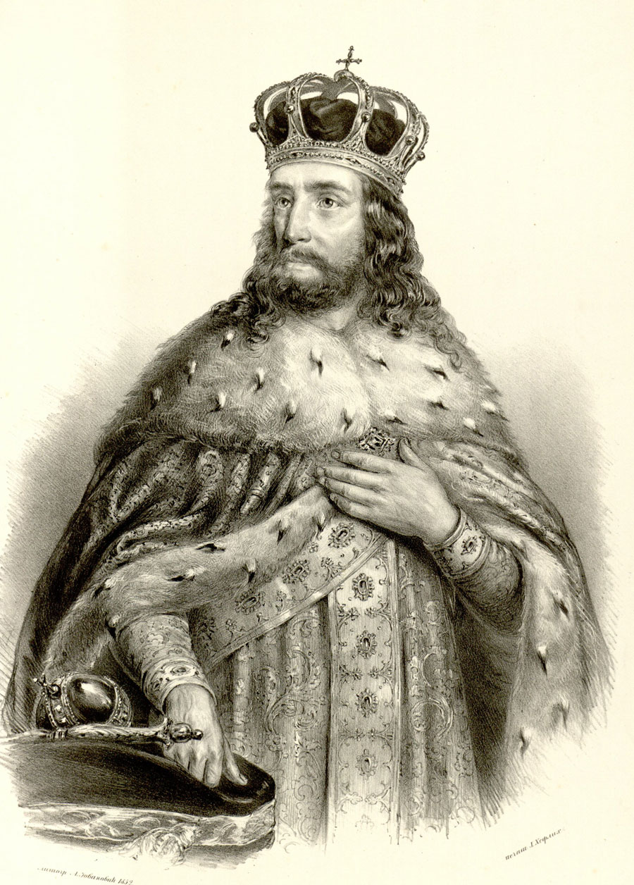 Stefan Uroš III Dečanski